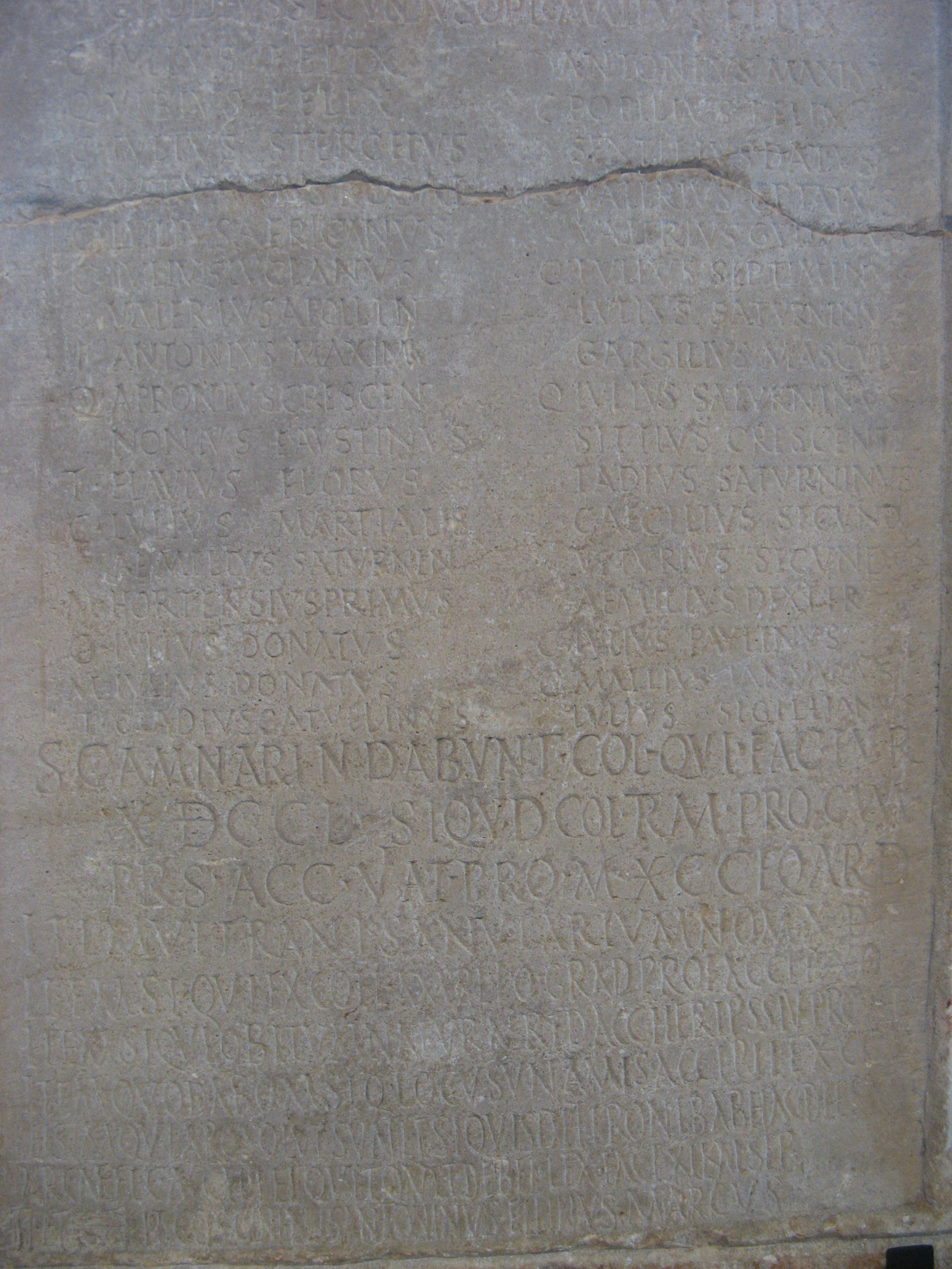 Détail de l'inscription latine CIL VIII, 2557 trouvée à Lambèse et conservée au Louvre, on voit ici la partie basse de l'inscription (liste des noms des cornicines et règlement de leur collège).